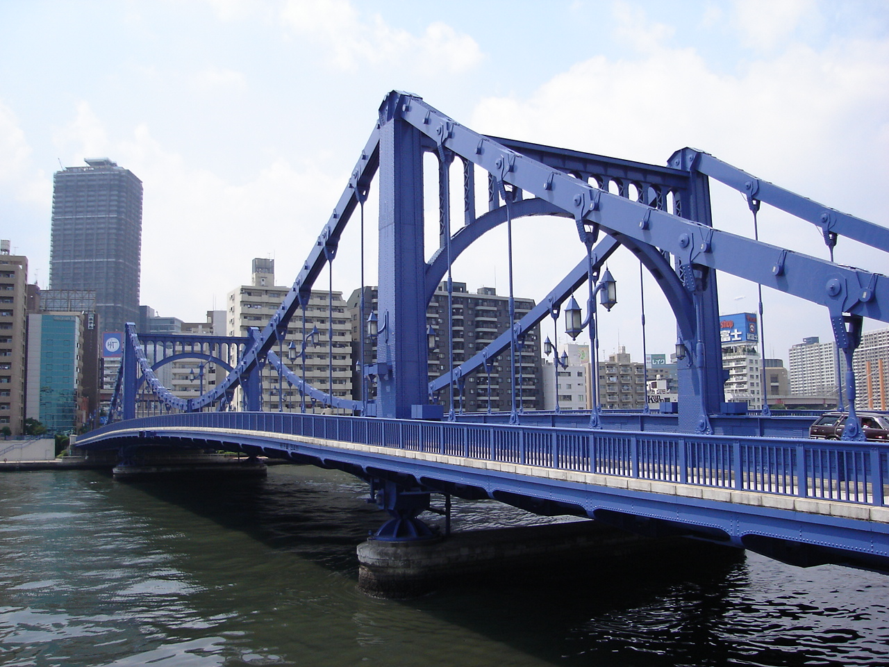 Tokyo.